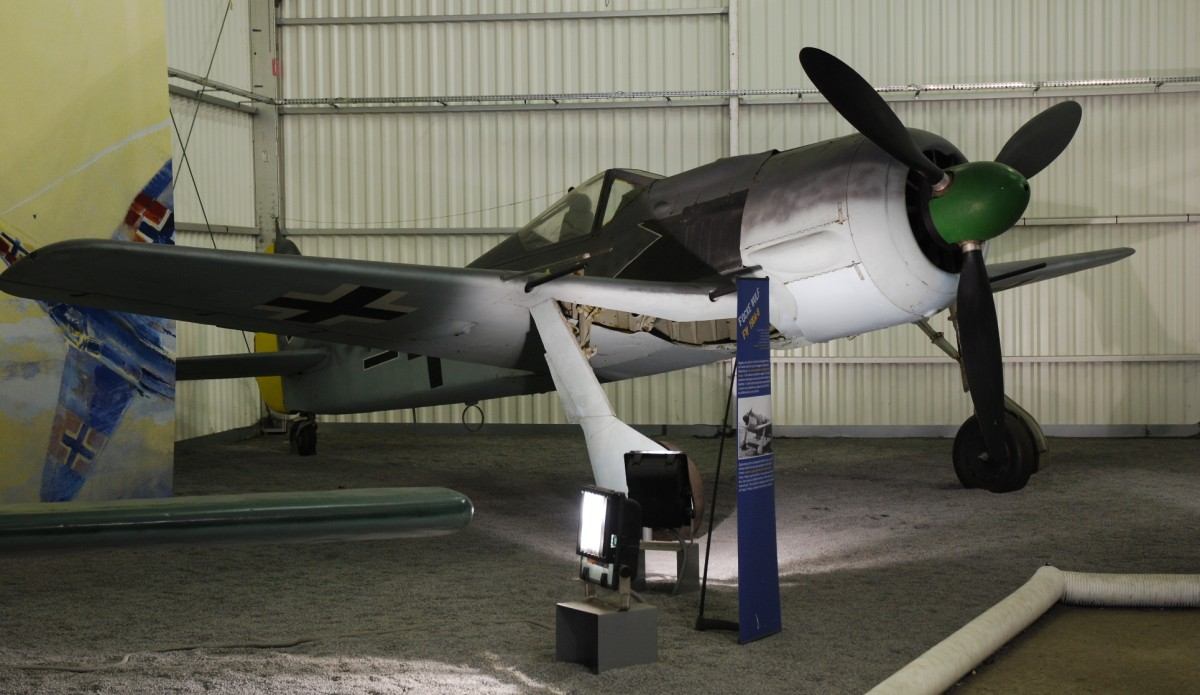 Focke-Wulf Fw 190 / NC.900 preserved at Musée de l'Air et de l'Espace